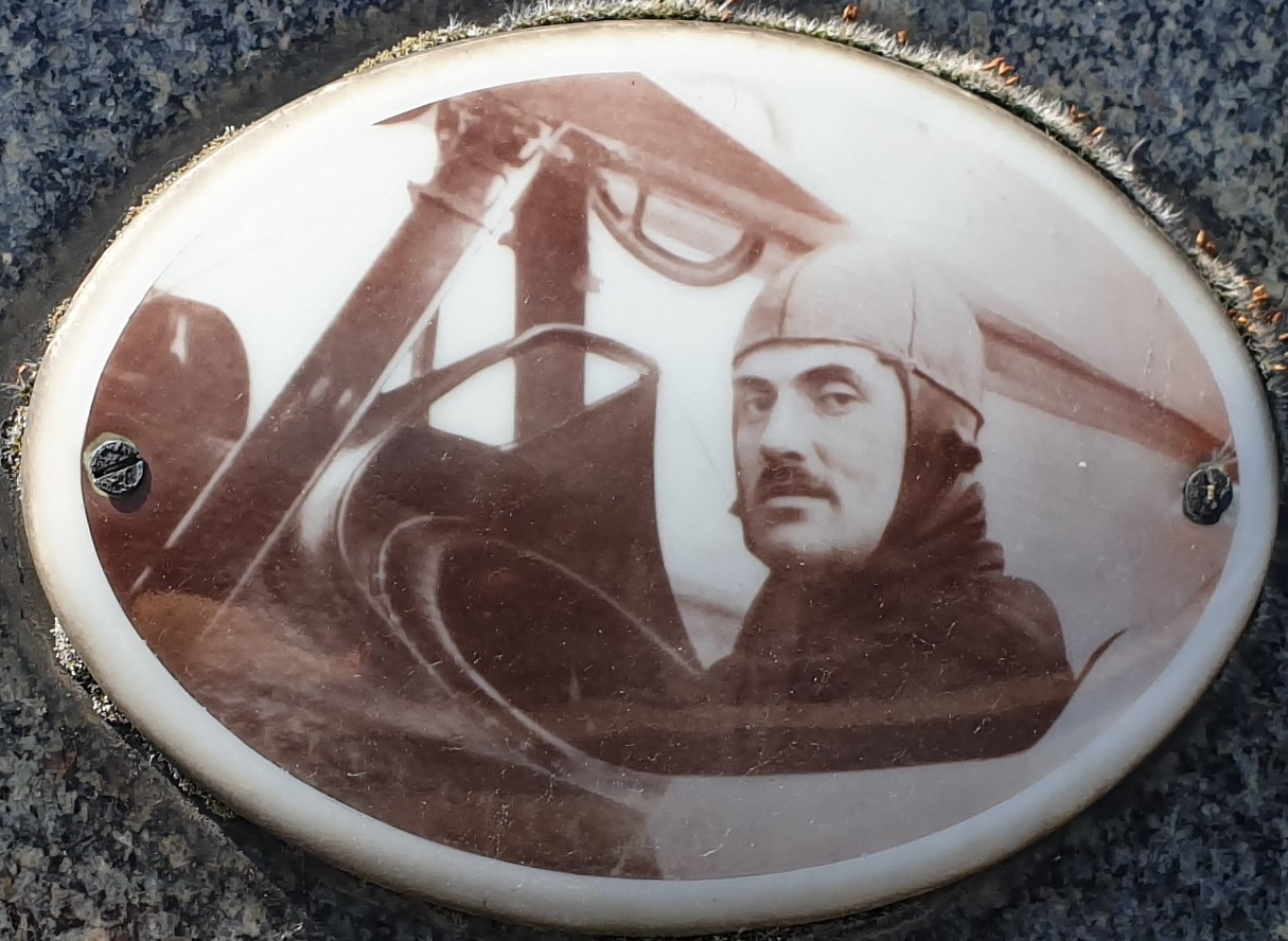 Médaillon sur la tombe de Maurice BAUWENS